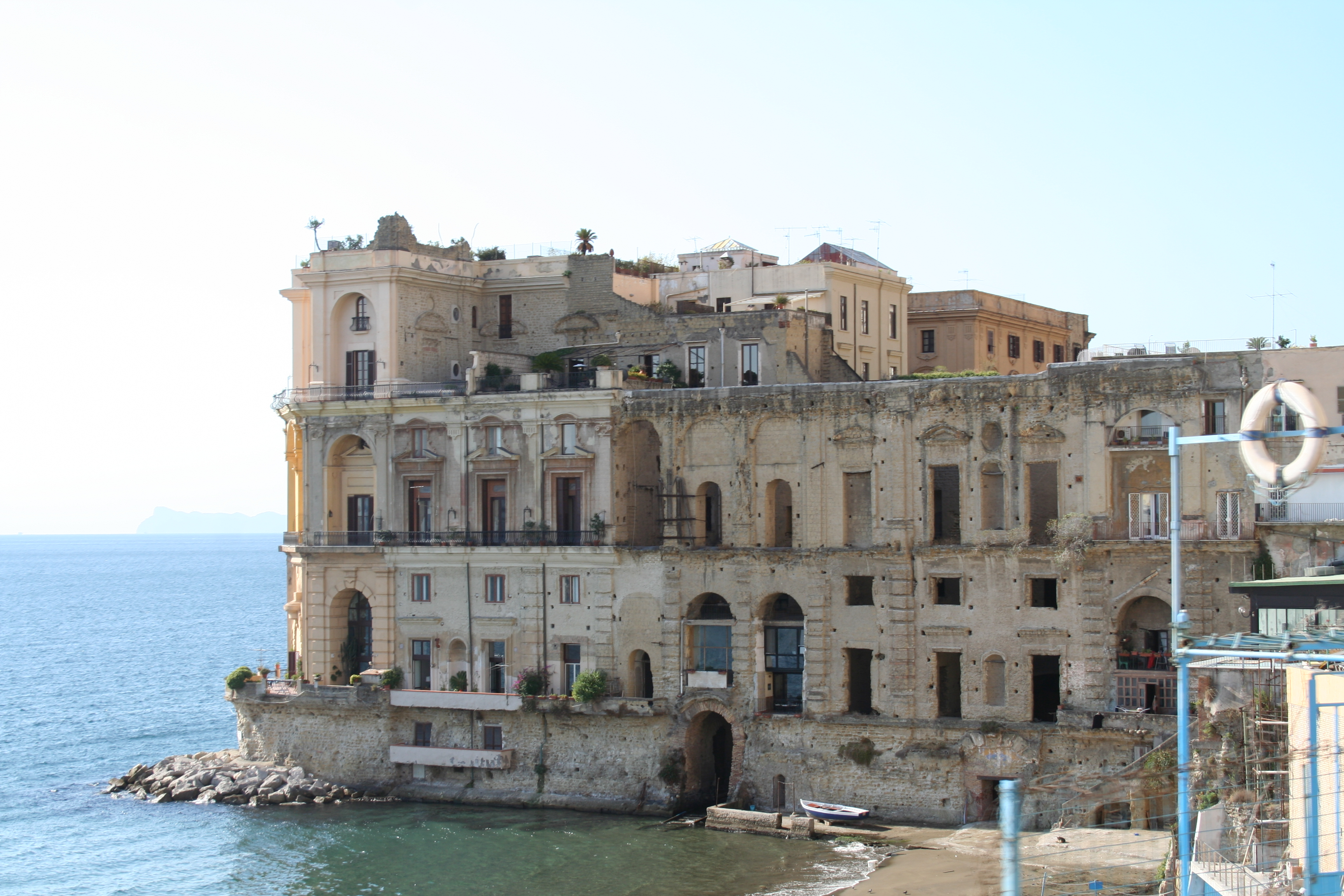 Palazzo donn'Anna (Napoli)